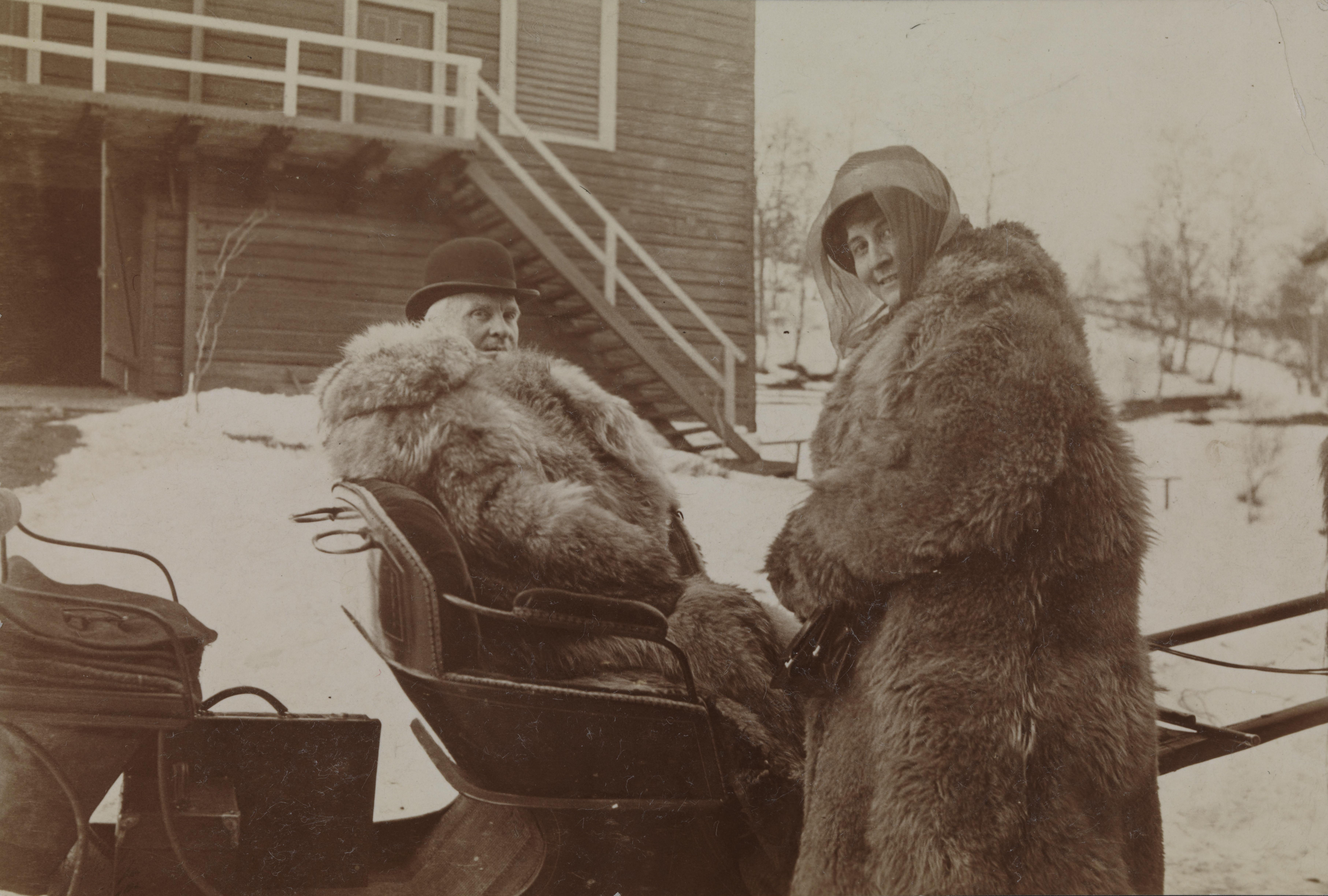 Bildet er hentet fra Nasjonalbibliotekets bildesamling. Anmerkninger til bildet var: Kommet til Nasjonalbiblioteket via Ginette Bjørnson-Langen (datter av Dagny Sautreau (1876-1974) og Albert Langen (1869-1909)) Depicted person: Bjørnson, Bjørn Depicted person: Bjørnson, Eileen Bendix